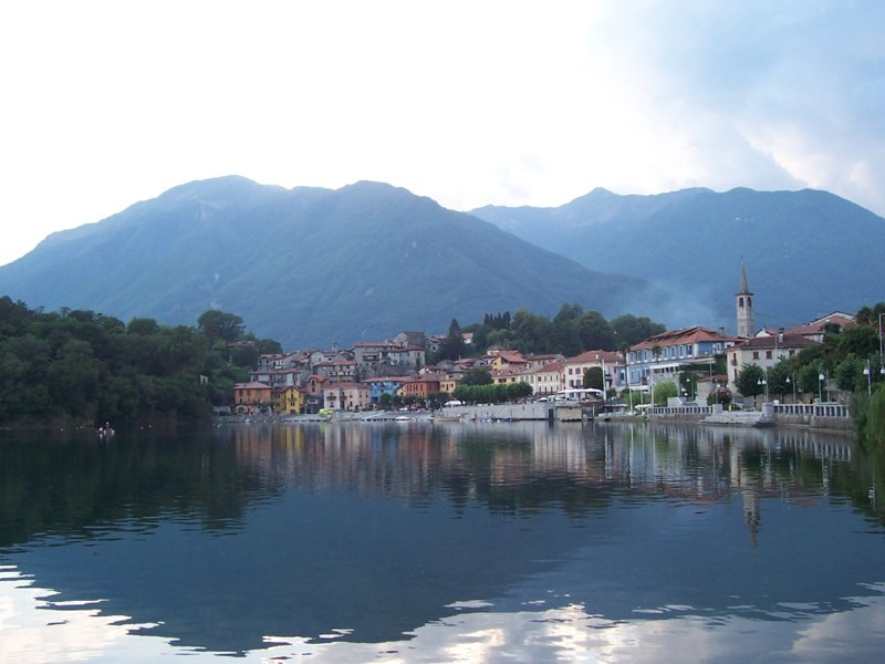 Mergozzo